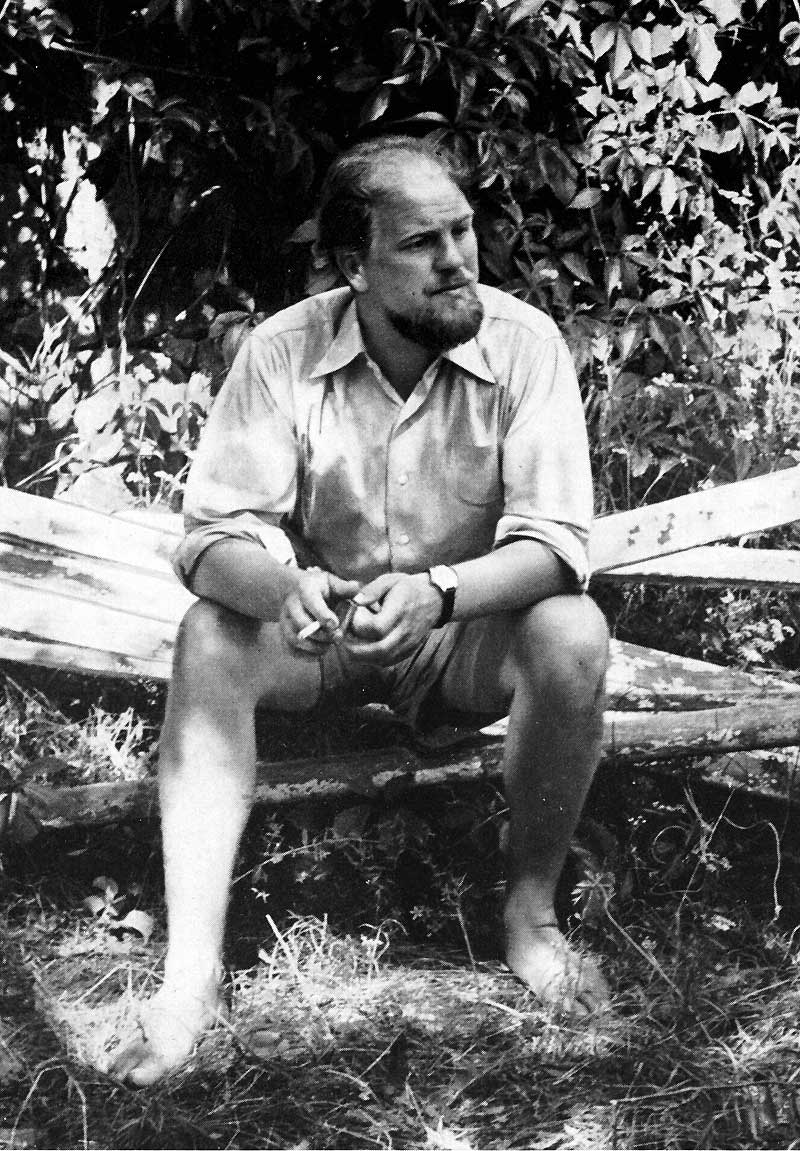 Stig Sjödin